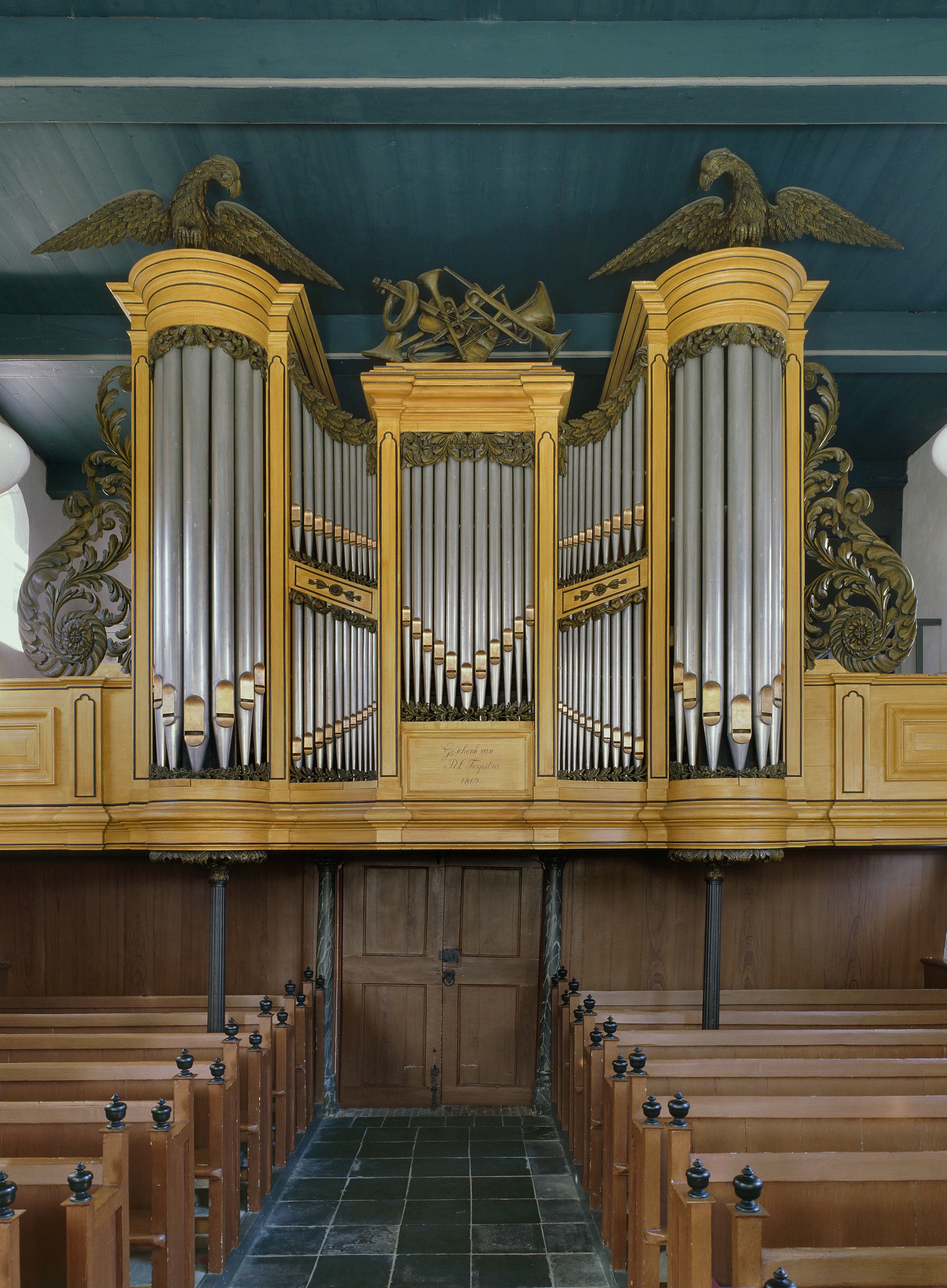 Voormalige Hervormde kerk: Interieur, aanzicht orgel, orgelnummer 1565 (opmerking: Gefotografeerd voor Het Historische Orgel in Nederland 1865-1872)